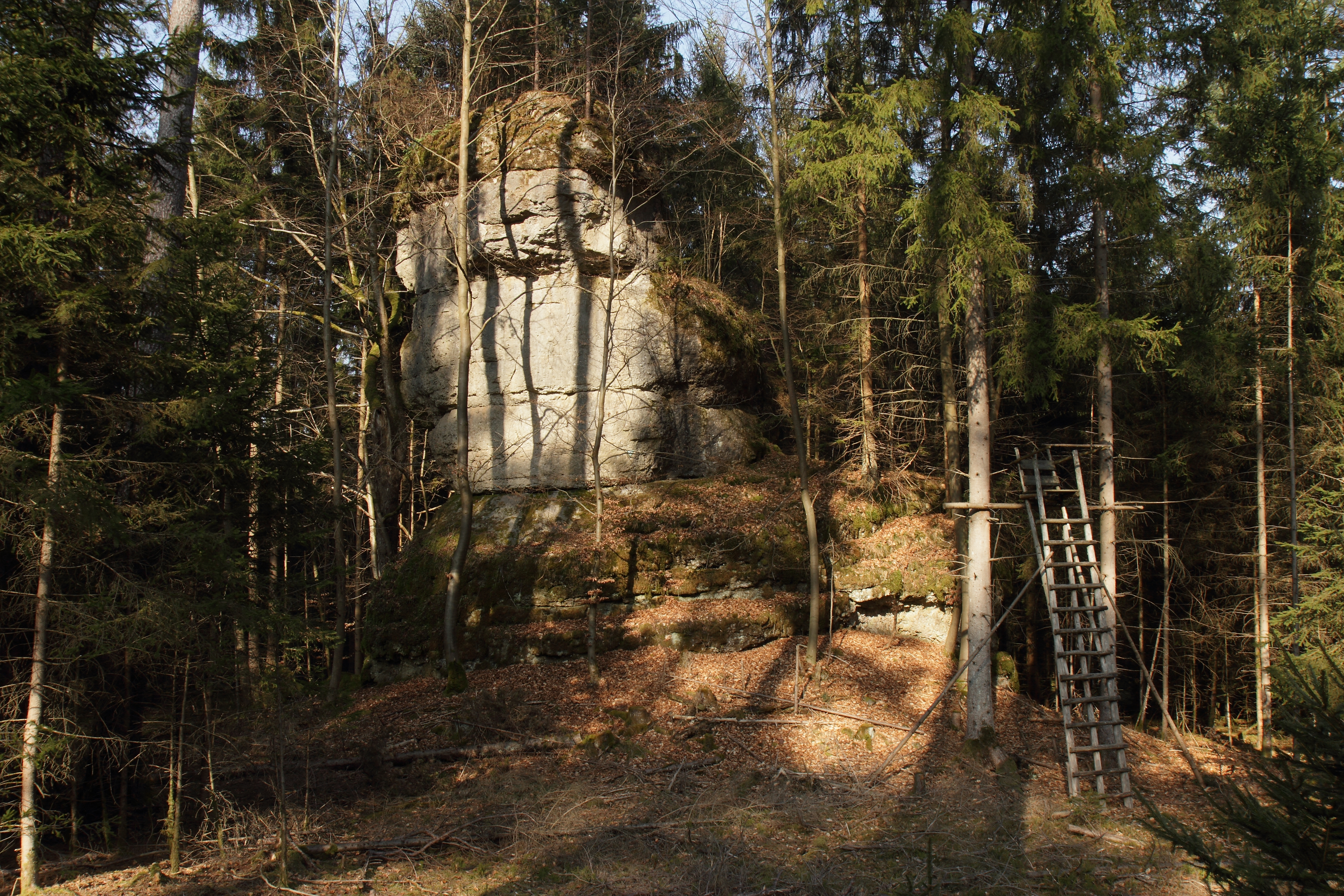 Naturdenkmal Dolomitturm Zuckerhut, sowie Geotop Nummer 472R088